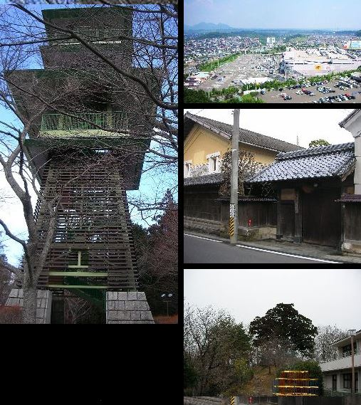 宮城県黒川郡富谷町